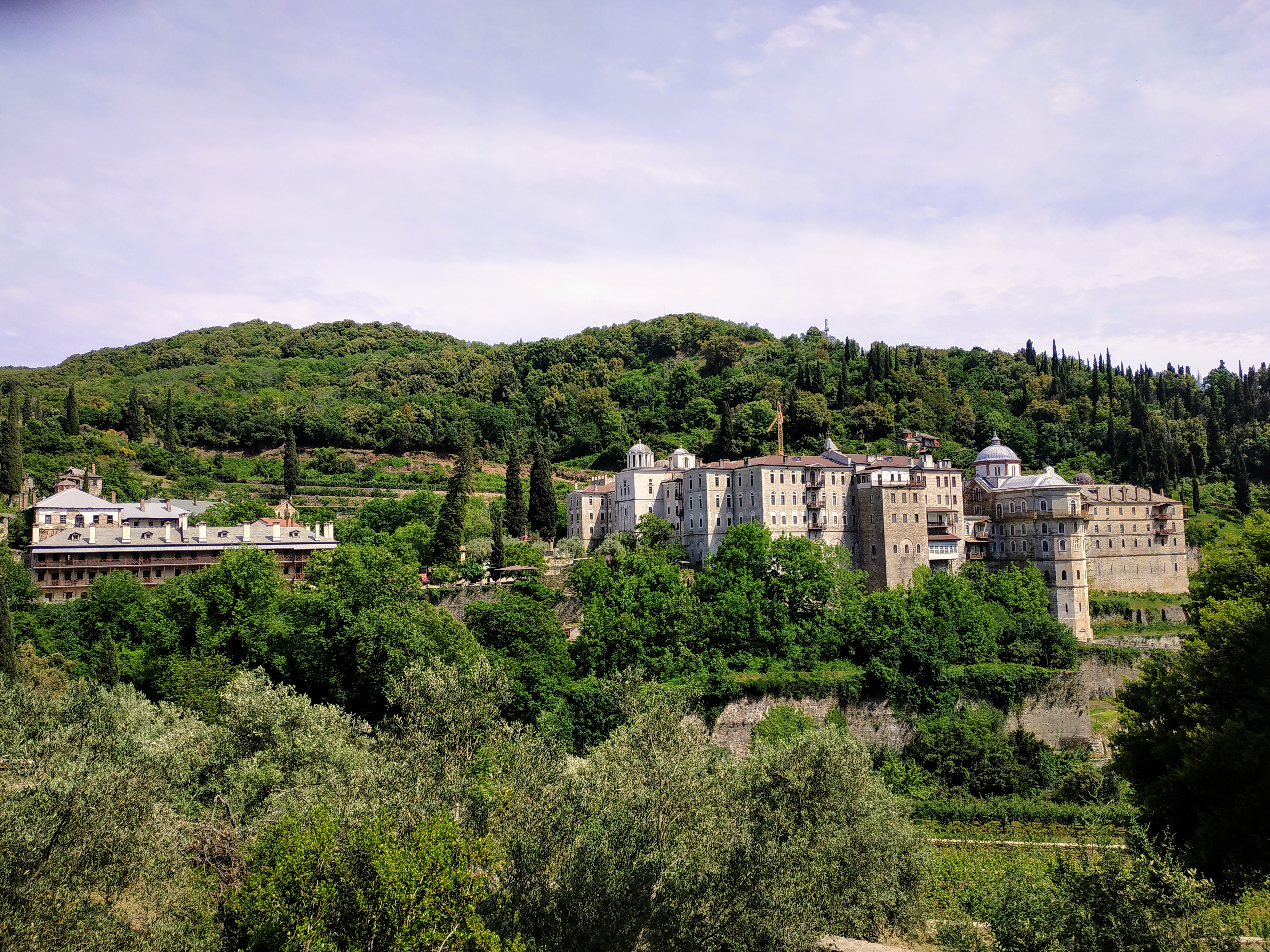 Монастир у 2019 років